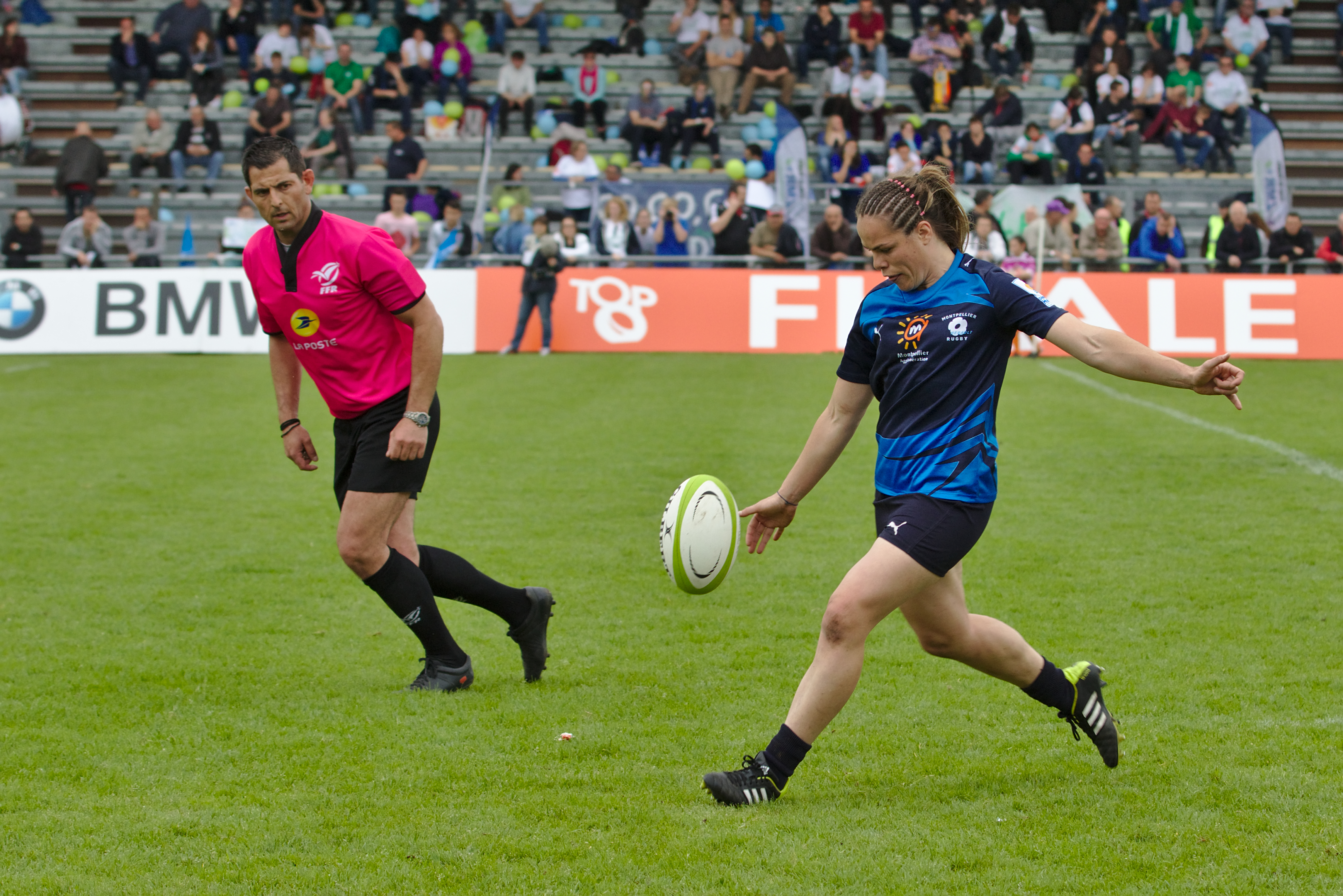 Finale Top 8 2015 - MHR vs LMRCV - 20150502 - Elodie Poublan